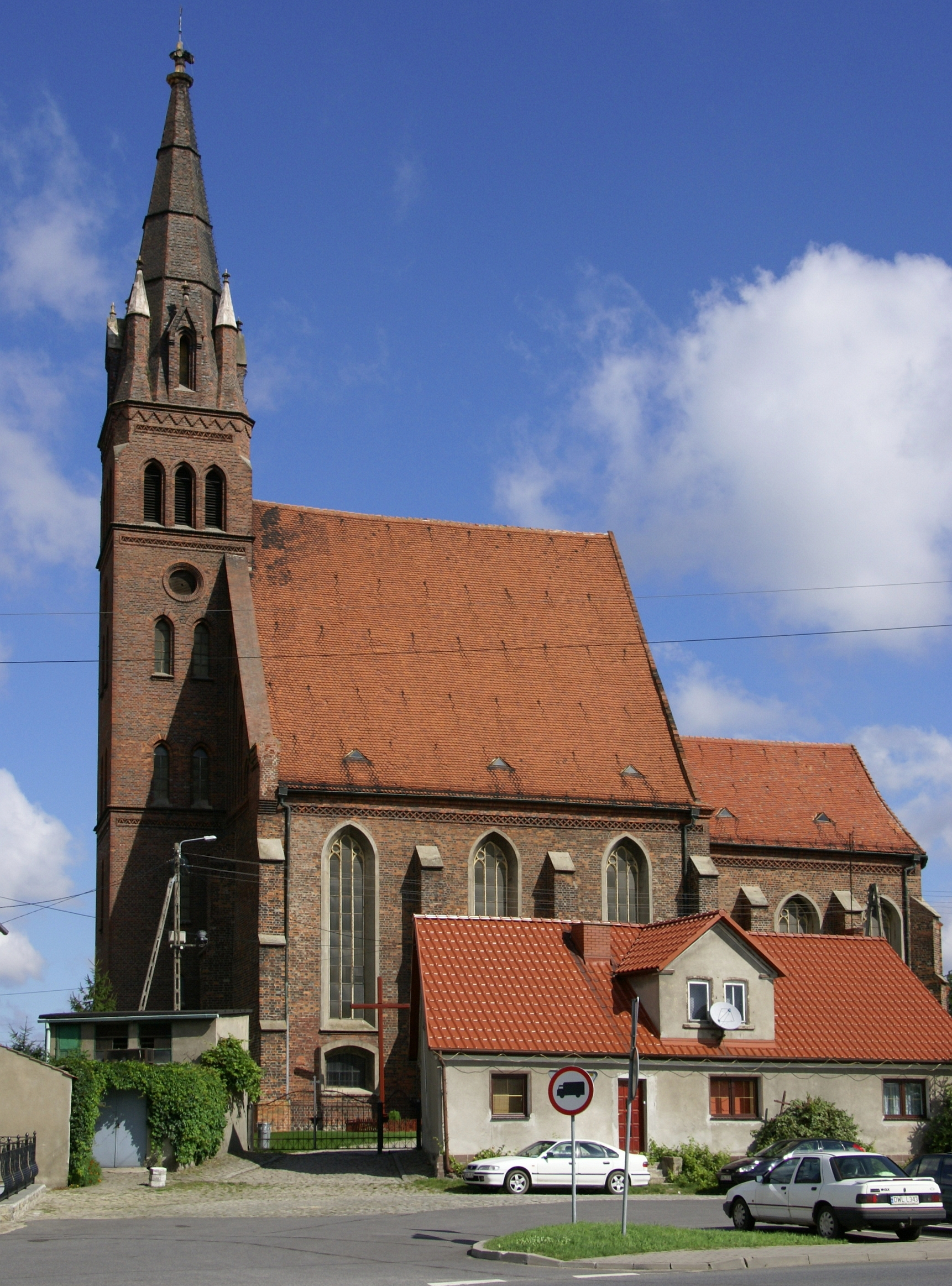 Wińsko, ul. Rawicka - dawny kościół ewangelicki, obecnie rzymskokatolicki kościół pomocniczy pw. Świętej Trójcy, 1549-62, 1872-77, 1997